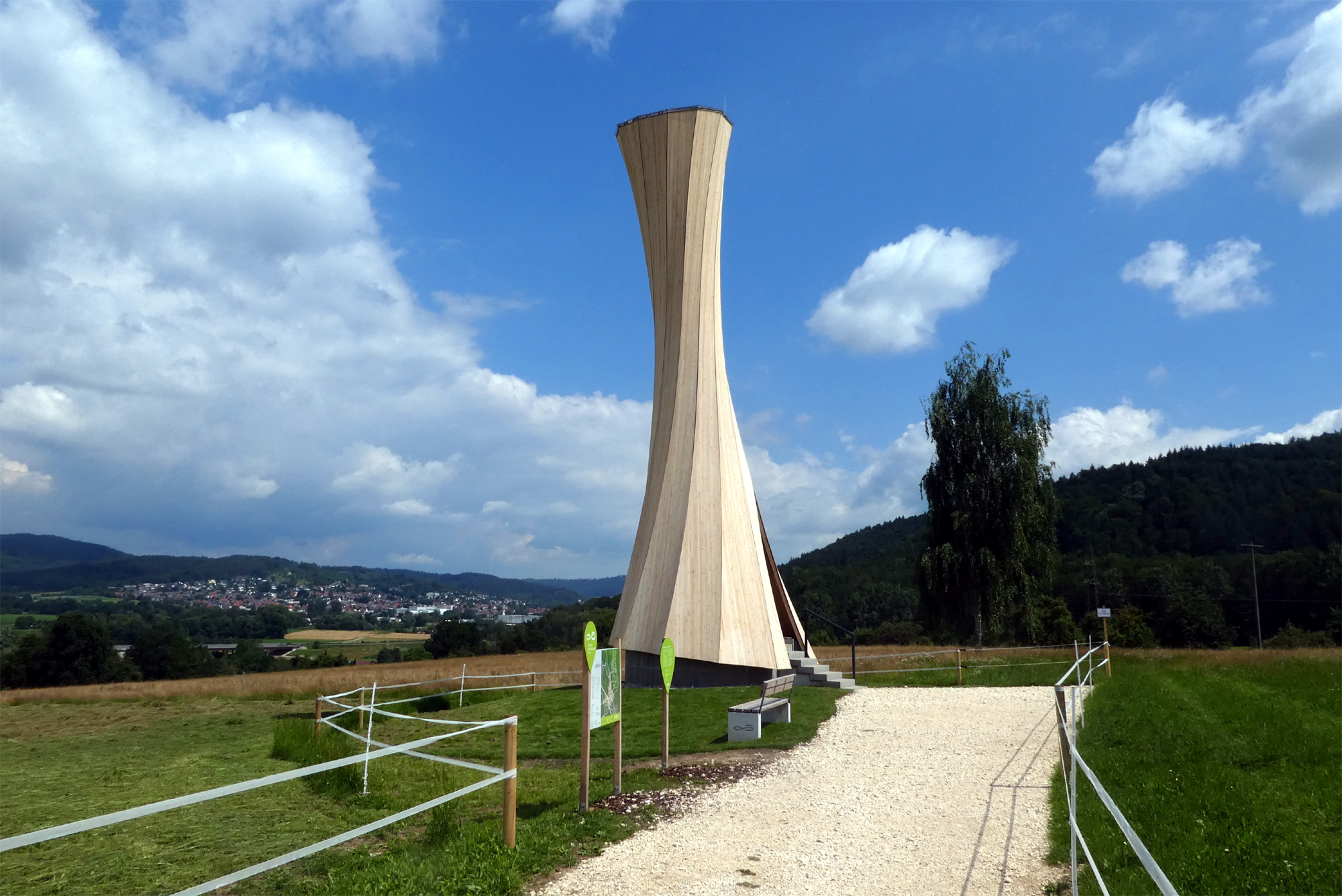 Urbach - "Turm an der Birke". Das Bauwerk entstand als Station 7 der "16 Stationen" der Remstal-Gartenschau 2019.